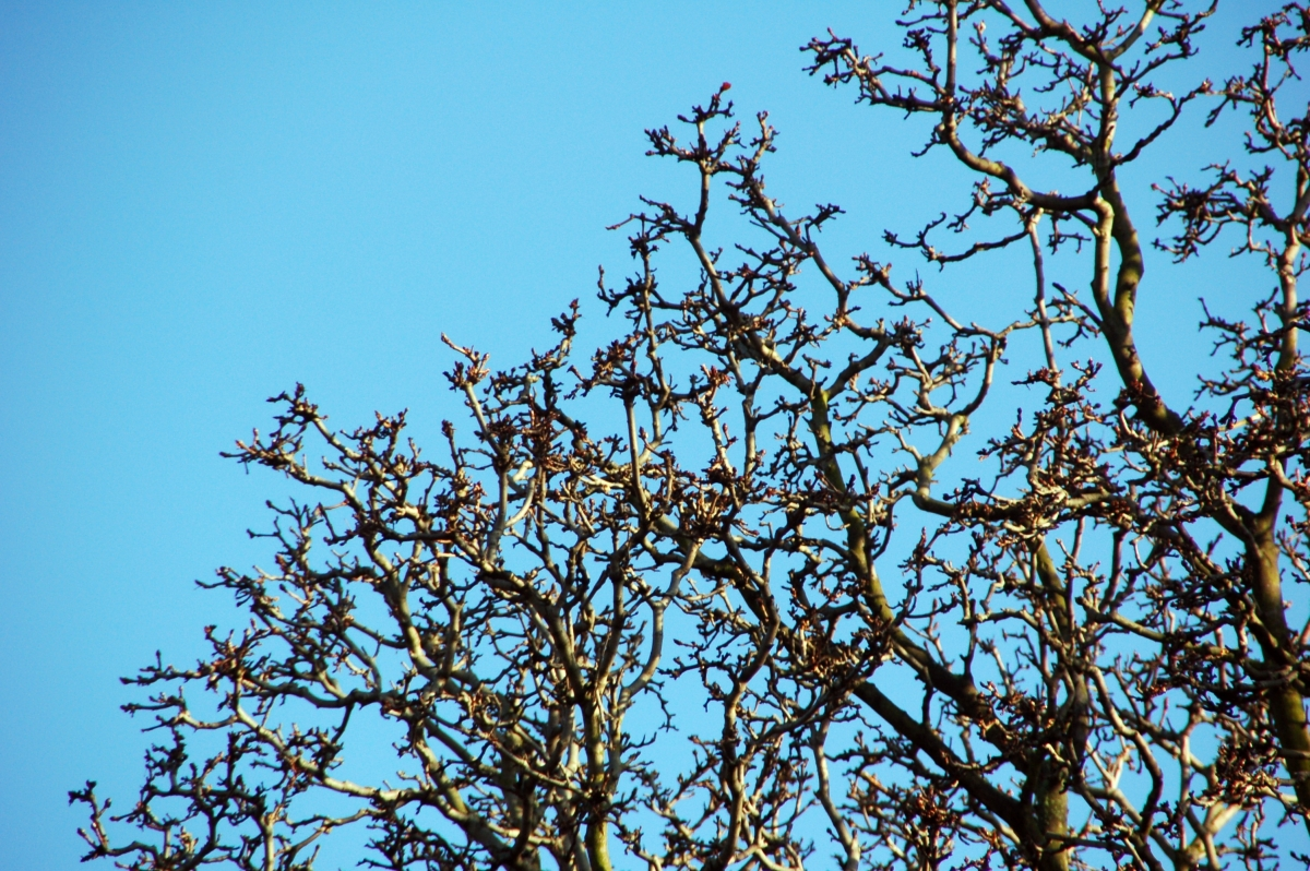 Verbiß an Rosskastanien durch die Halsbandsittiche Psittacula krameri, Schloßpark Biebrich, Wiesbaden, Hessen, Deutschland